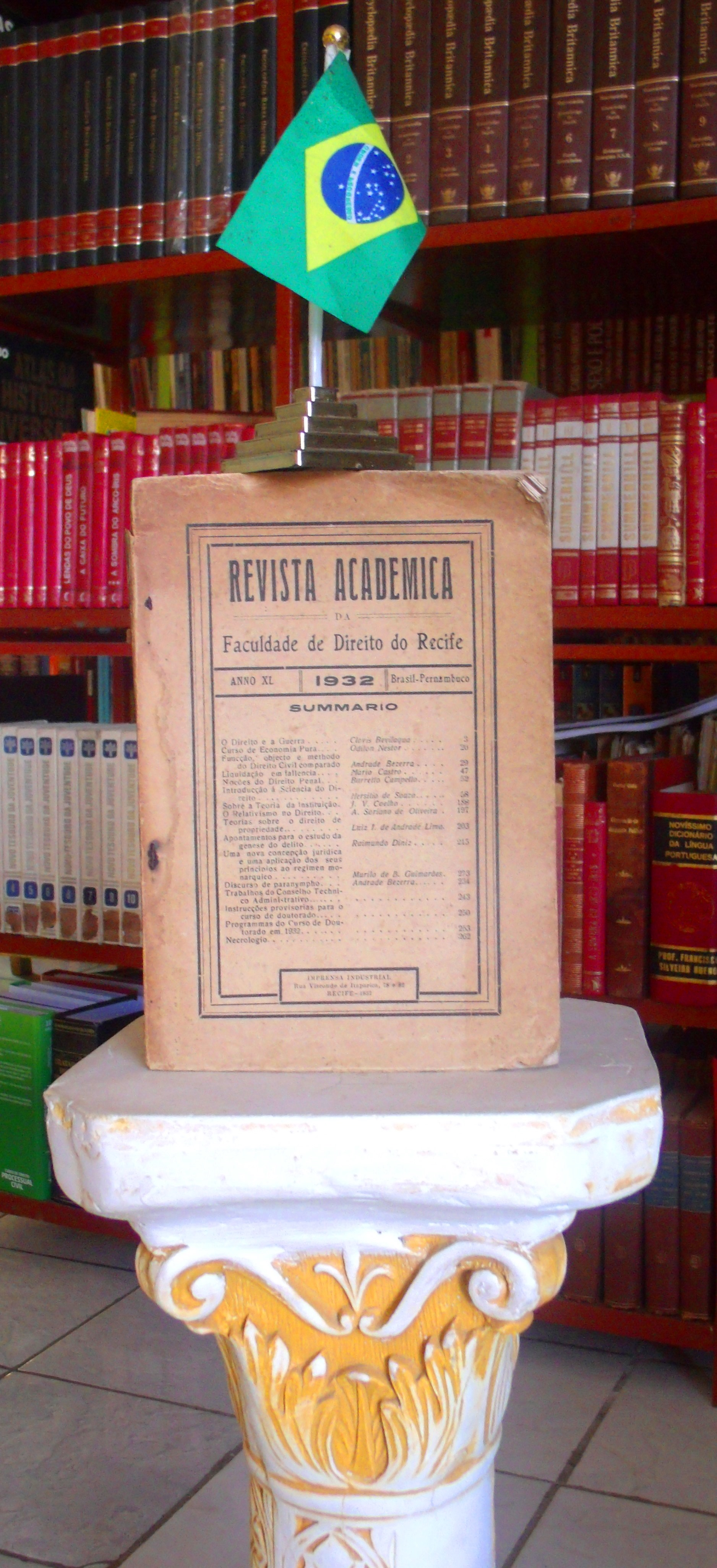 Edição de 1932 da Revista Acadêmica da faculdade de Direito do Recife, exposta por colecionadores numa biblioteca pública municipal.